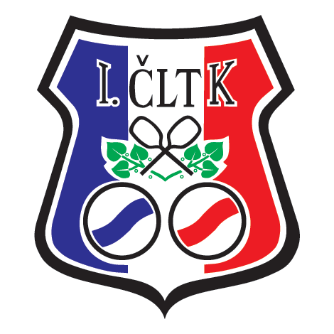 Logo des I. ČLTK Prag